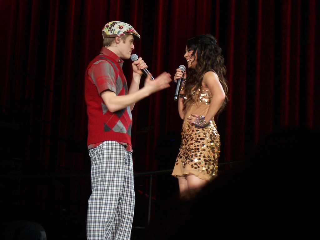 Vanessa & Lucas.